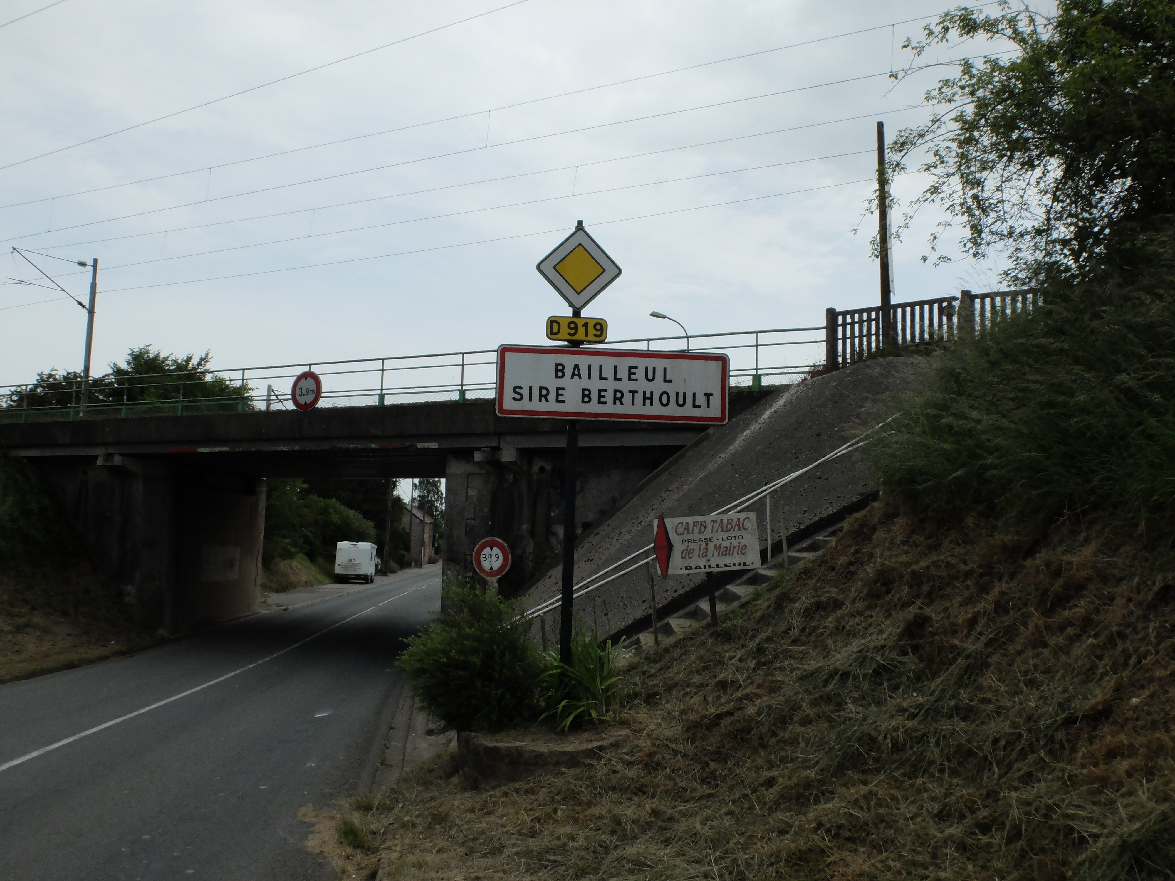 Vue d'une entrée de la commune de Bailleul-Sir-Berthoult, au second plan la gare en hauteur.